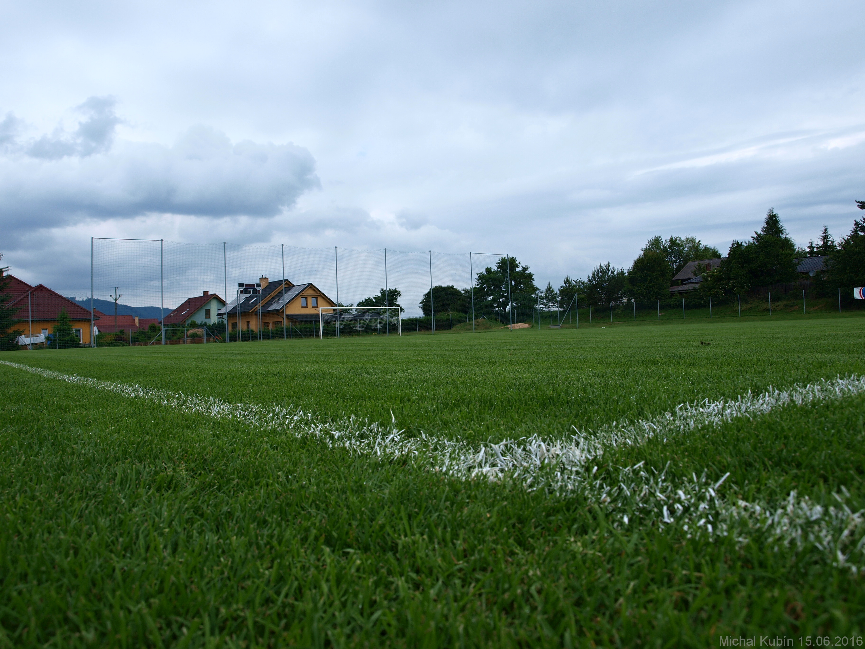 Sportovní areál Kunčina - hrací povrch fotbalového hřiště